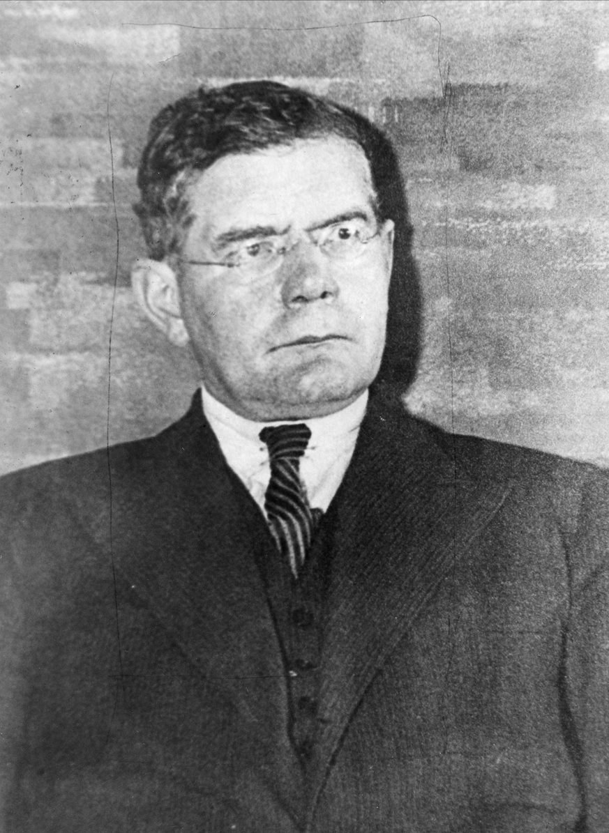 Jens Olaf Gjerløw, redaktør i Morgenbladet 1929–1949